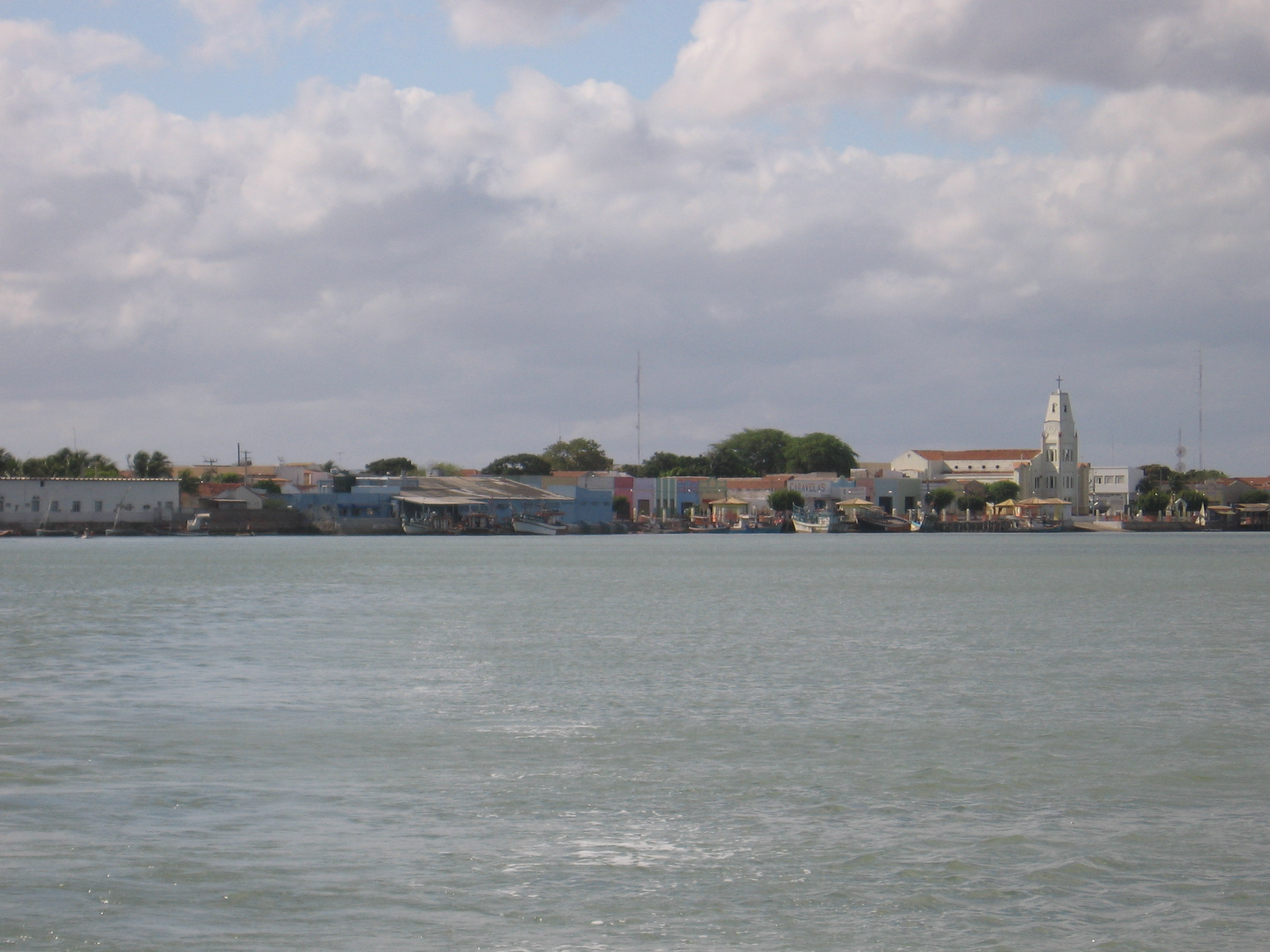 Centro de Areia Branca/RN - Visto do Rio Mossoró, Brasil.